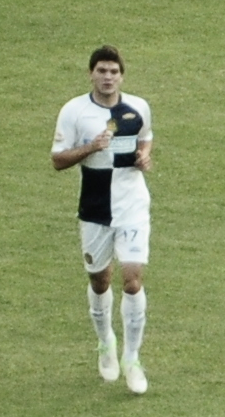 Partido del 18 de marzo de 2013, Rosario Central 2-Olimpo 2; Fernando Coniglio de Rosario Central.